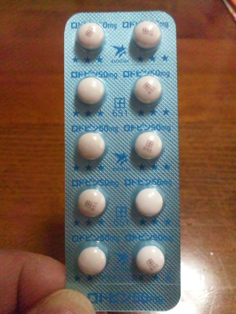 ロドピン50㎎ヒート